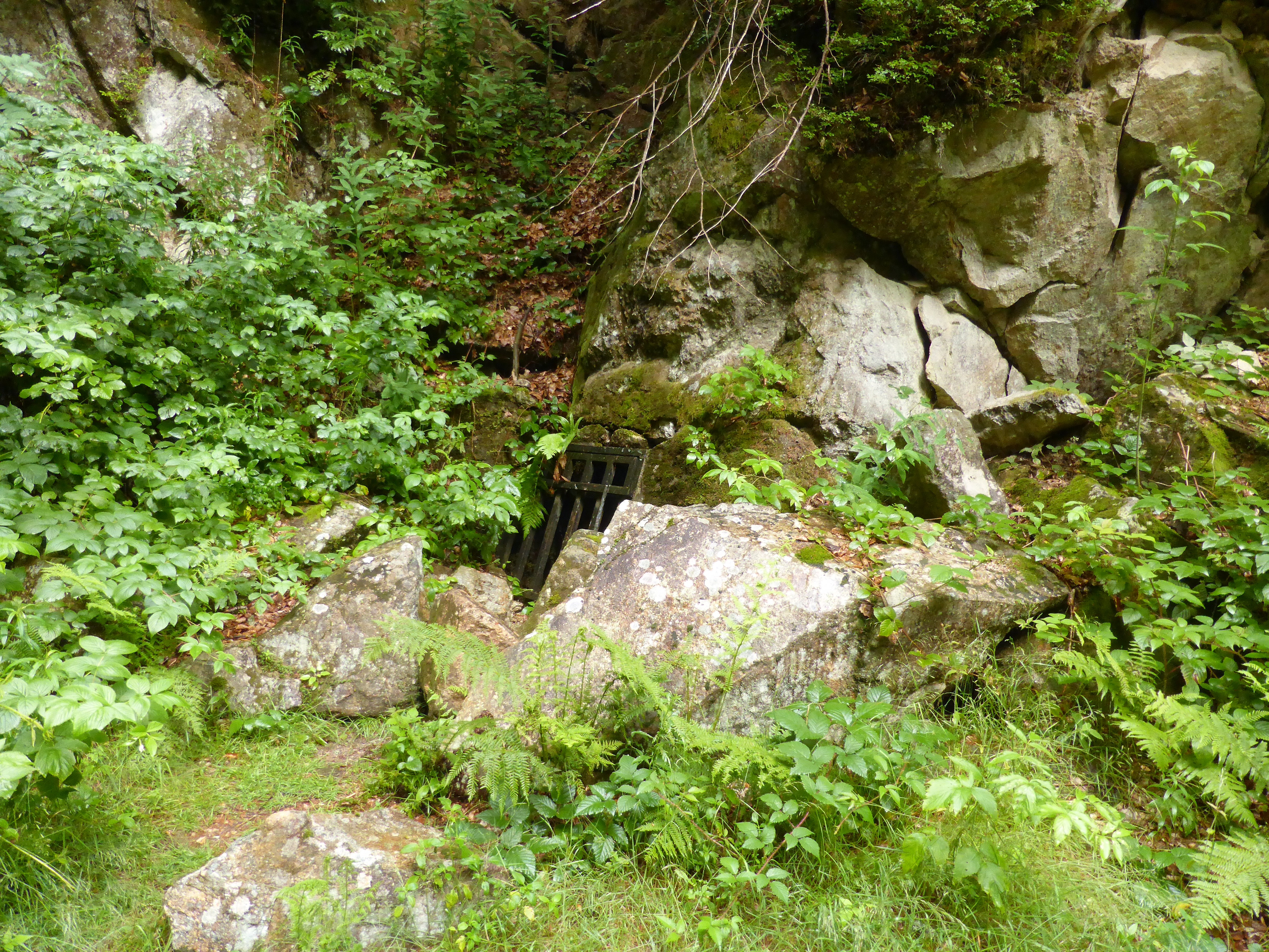 Pegmatitgrube am Hennenkobel nordwestlich der Ortschaft Rabenstein im Landkreis Regen. Der Abbaustollen ist durch ein Gitter geschlossen. Die Grube wurde bekannt durch verschiedene Mineralienfunde. Infotafeln geben Einblick in die Geschichte der Grube. Der Stollen liegt in einem Naturschutzgebiet. Die Pegmatitgrube ist Geotop im Landkreis Regen mit der Nummer 276 G 001.